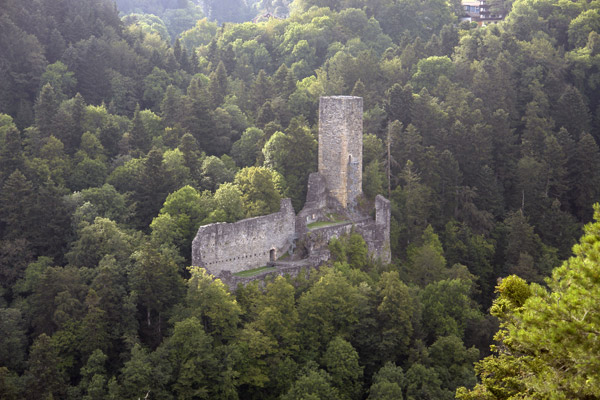 Blick auf die Burgruine Wieladingen